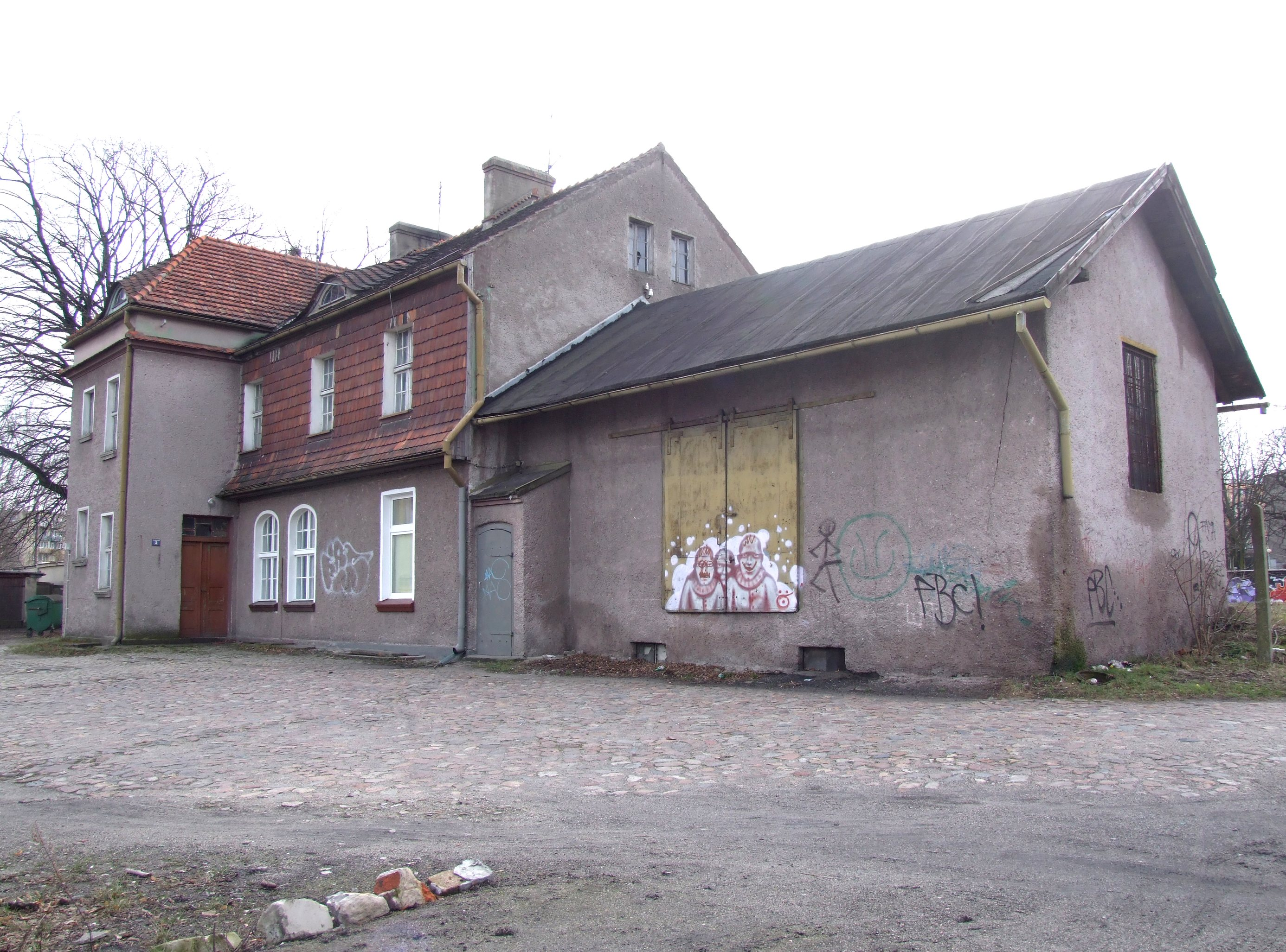 The building of the former Upper Town railway station in Zielona Góra. Budynek dawnego dworca Kolejki Szprotawskiej - Zielona Góra-Górne Miasto (Grünberg-Oberstadt) przy ulicy Ogrodowej w Zielonej Górze Author: Mohylek 15:49, 28 February 2007 (UTC)